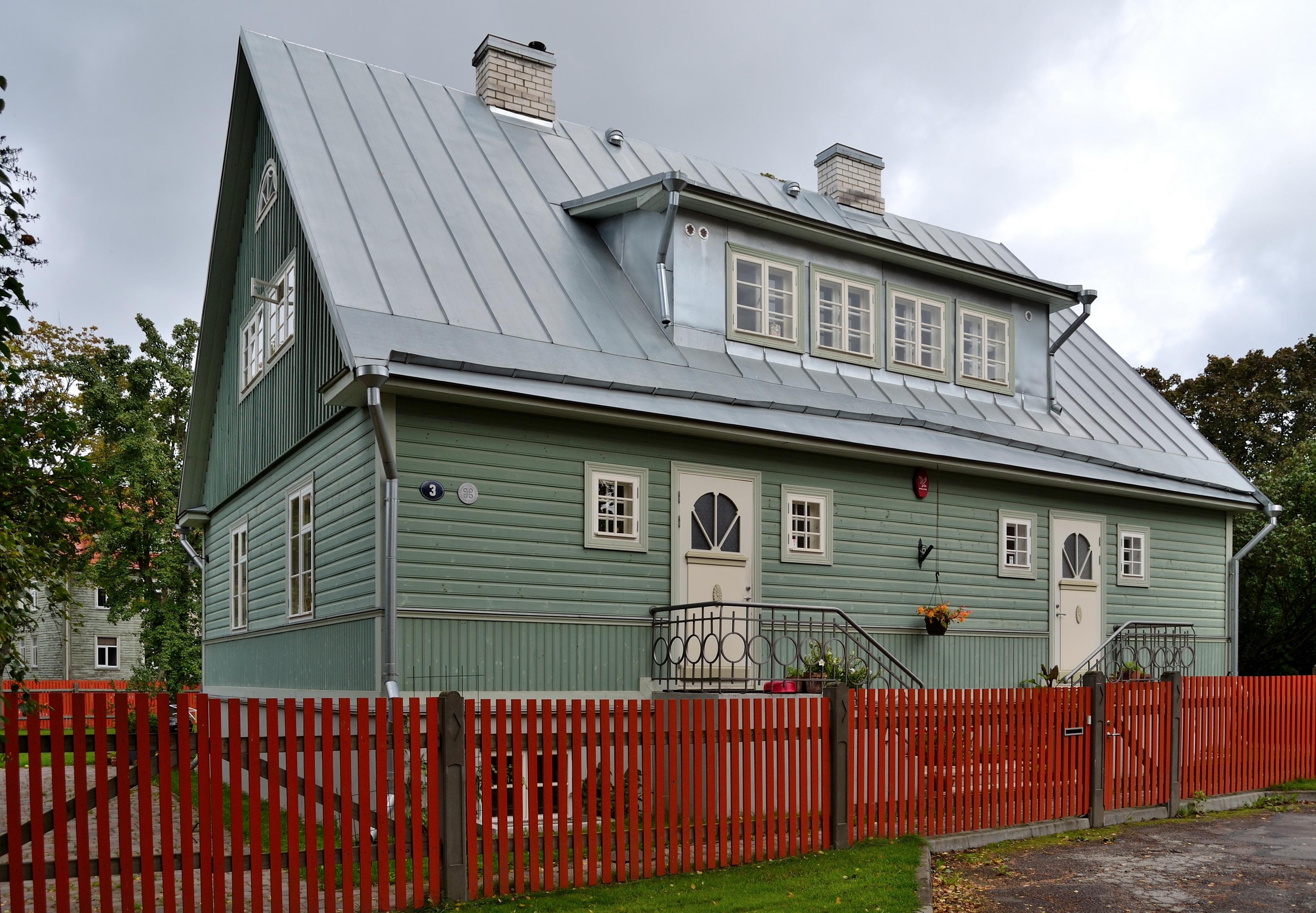 Tallinn, elamu Sõmera 3, 1927